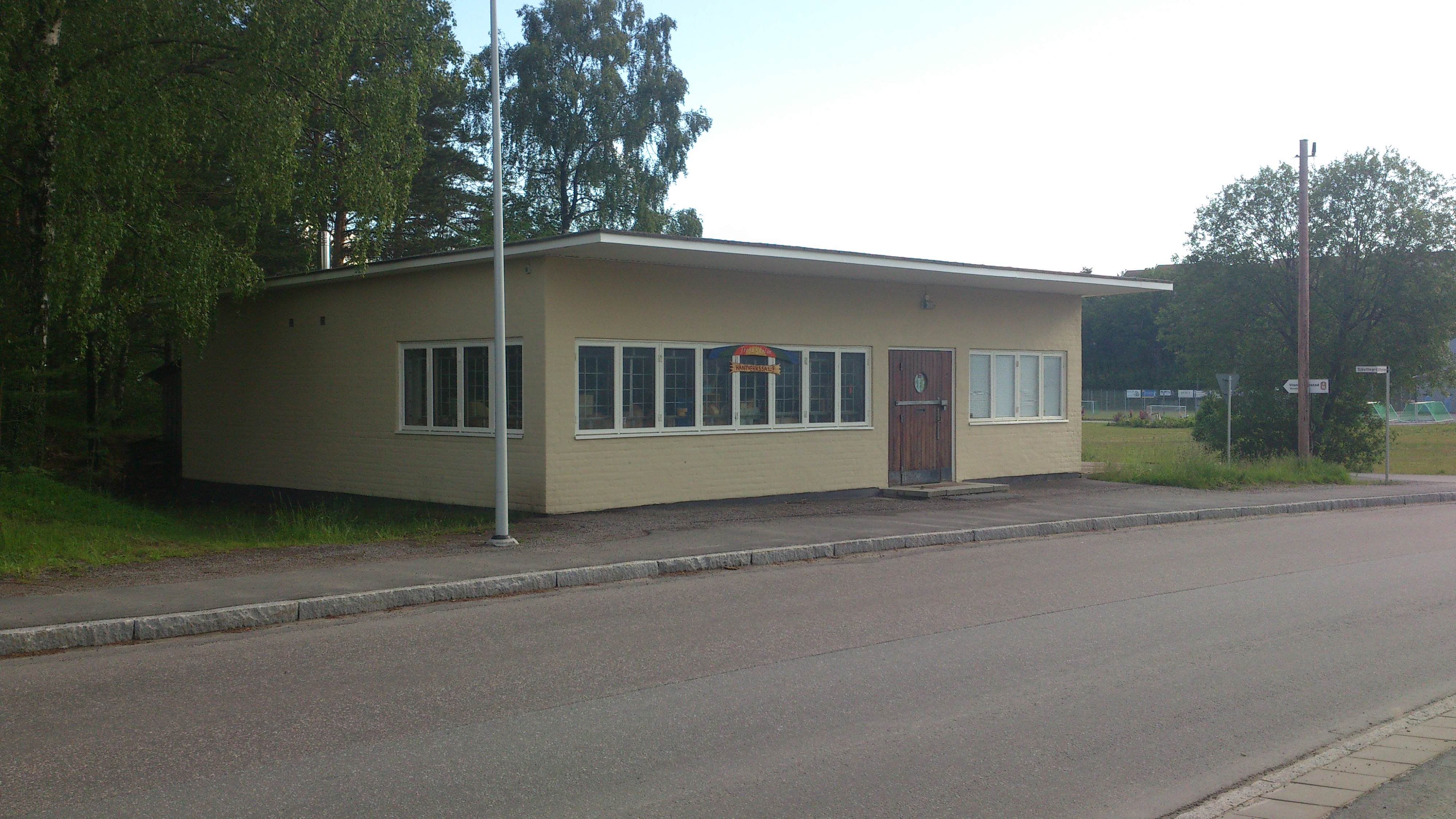 Vaktkasern uppförd 1939, vid f.d Roslagens flygflottilj eller även känt som F 2 Hägernäs.